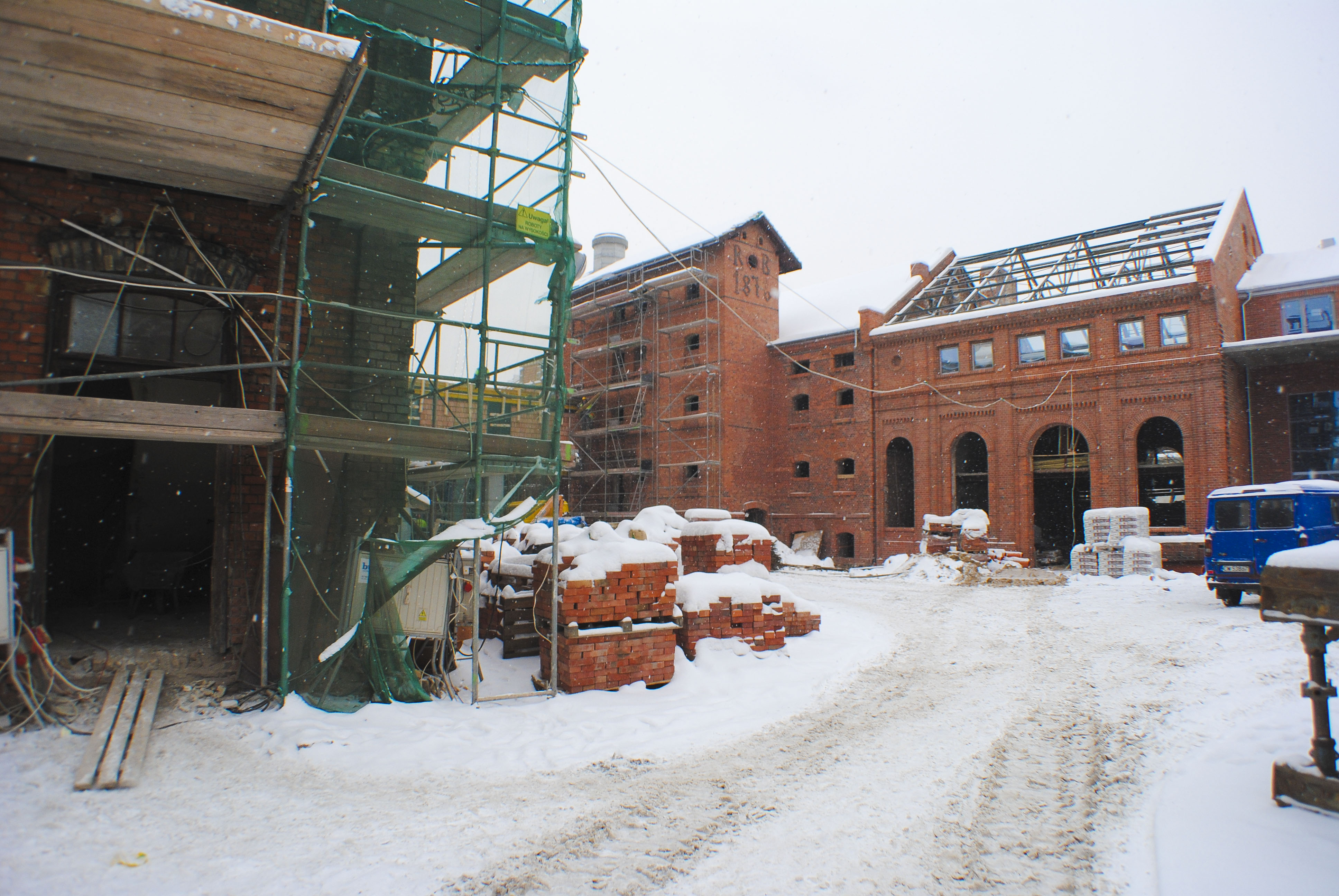 Zdjęcie przedstawia prace budowlane przy rewitalizacji zespołu browaru Bojańczyka we Włocławku na cele projektu Centrum Kultury Browar B